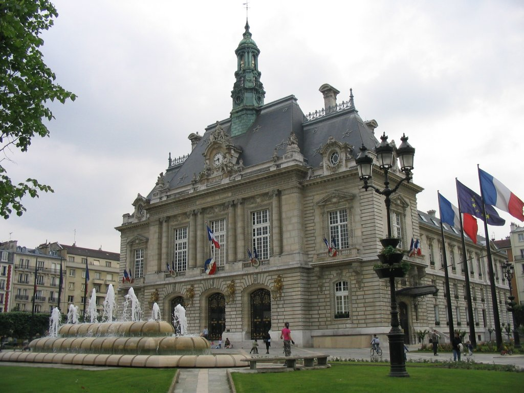 Mairie de Levallois Perret